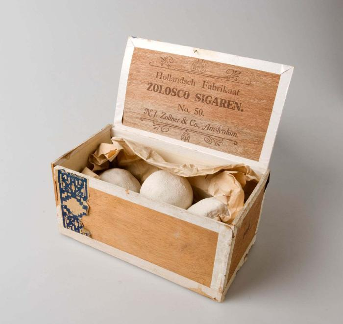 Klei. Witte klei (pemba dotee of pimba doti, ook wel pijpaarde), wordt gebruikt voor het insmeren van amuletten en andere voorwerpen die verband houden met magie en ritueel. Pemba dotti is een witte klei die voornamelijk in moerasgebieden voorkomt. Deze witte klei wordt niet, in tegenstelling tot wat men vaak denkt, gebruikt om de doden te verdrijven, maar om één met hen te worden. Het wit maken van het lichaam geeft de persoon de mogelijkheid om niet uit de toon te vallen bij de goden of geesten. Pemba dotti wordt vooral opgesmeerd door de Marrons (zie inventarisnummer 60005970) die tijdens winti rituelen dichter bij hun voorouders willen komen om hun hulp en/of advies te vragen. De pemba dotti wordt niet alleen gebruikt voor het insmeren van het lichaam, maar ook van de muziekinstrumenten die gebruikt worden bij het oproepen van de winti. . Brokken witte klei in een sigarenkistje Unknown language: Pemba dotee Pimba doti